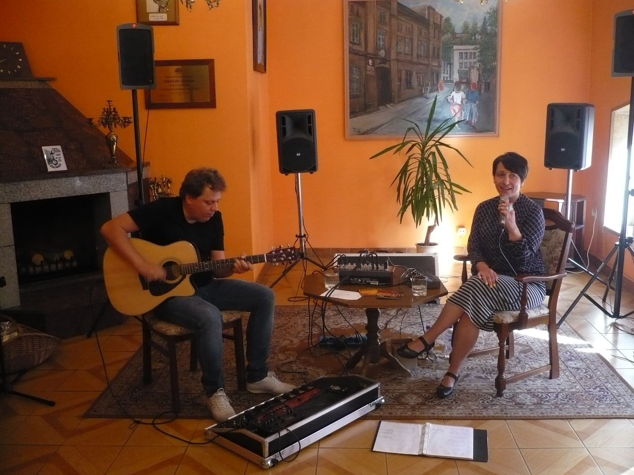 XXVI Noworudzkie Spotkania z Poezją